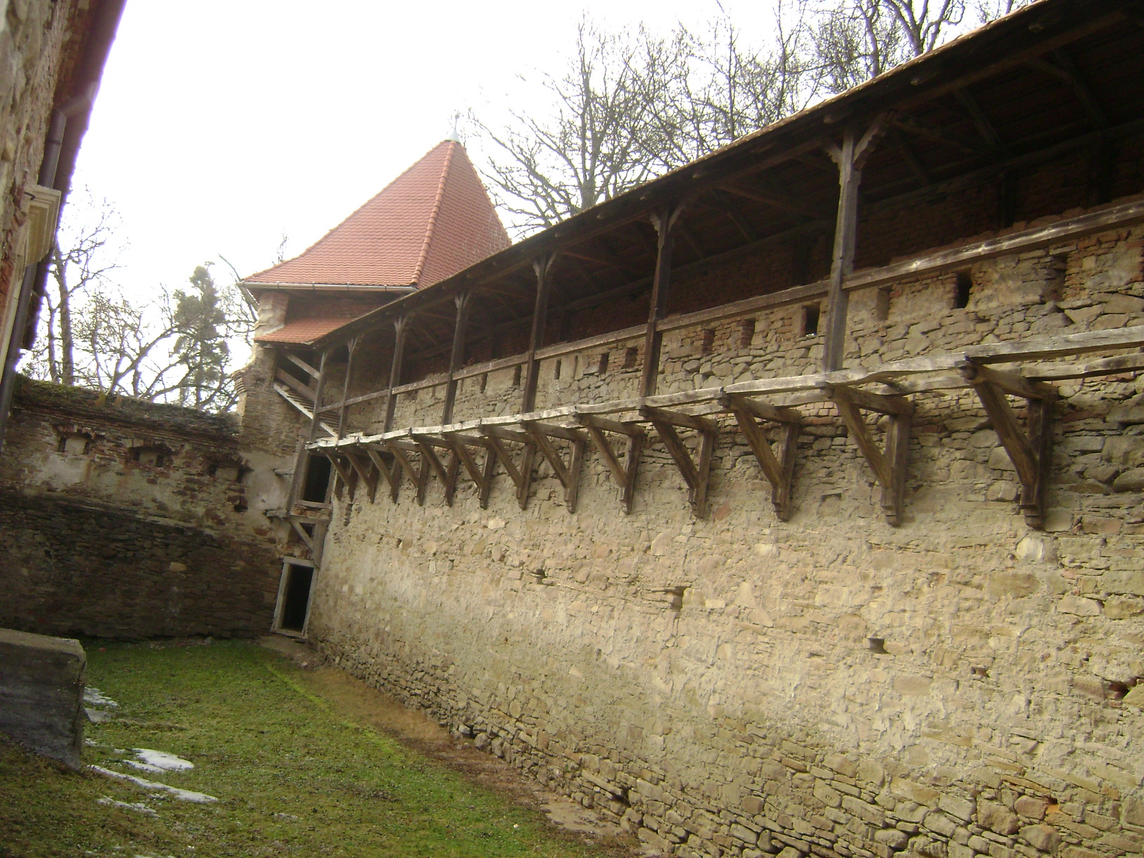 Castelul Bethlen din Criș, Mureș, România